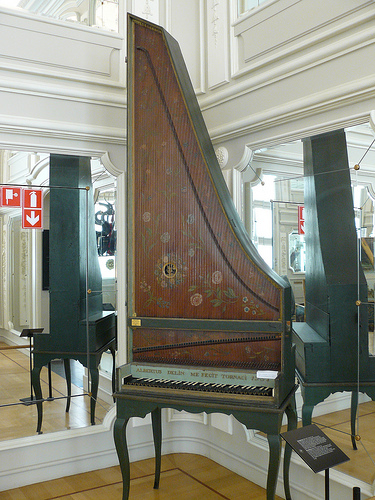 Clavicytherium de 1751 par Albert Delin - Bruxelles, Musée des Instruments de Musique References Inv.No.0554: Clavicytherium (1751) by Albert Delin - Musical Instruments Museum, Brussels. MIMO-DB.